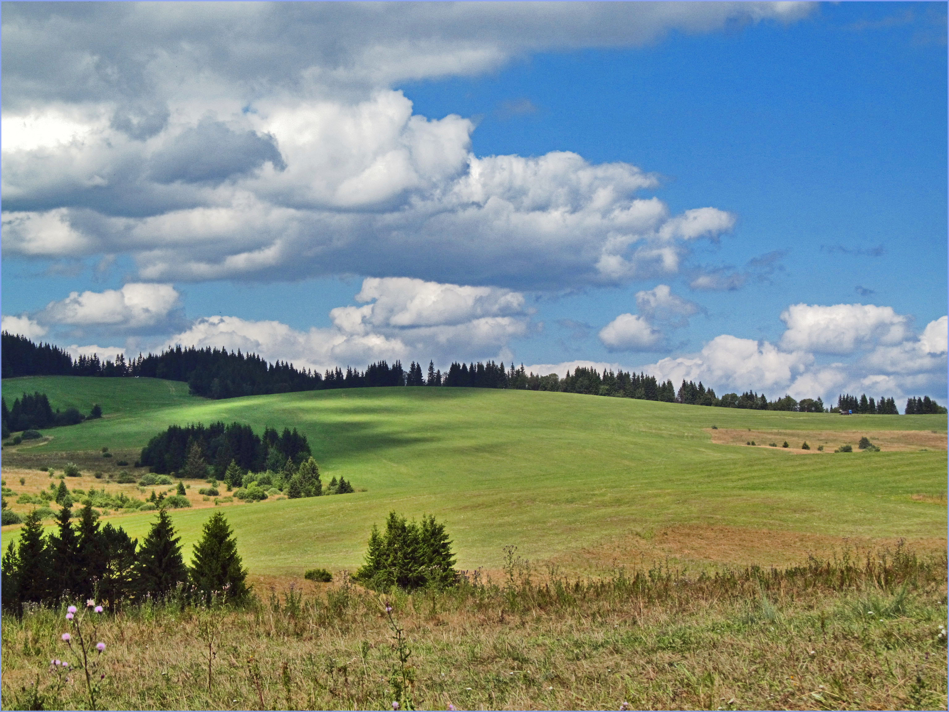 Na Svorade